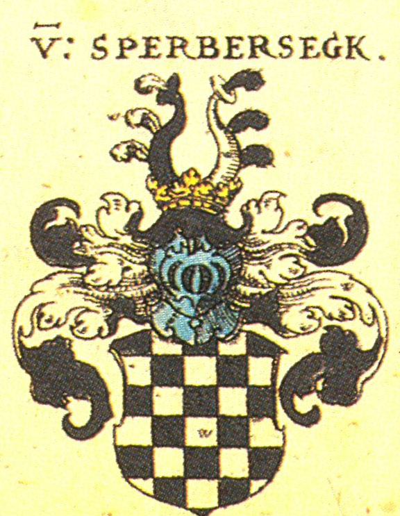 Ritterschaft und Adel in Schwaben von Sperberseck